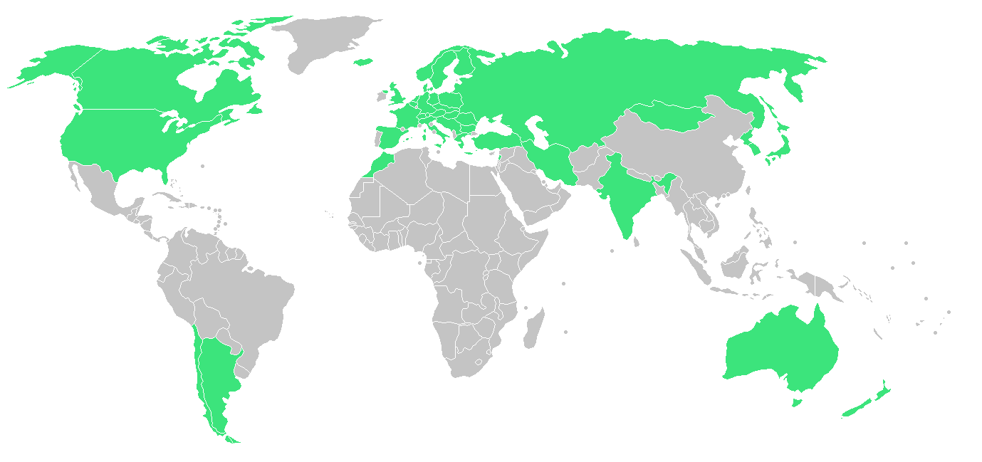 Carte des pays participant aux Jeux olympiques d'hiver de 1968 à Grenoble (en vert).